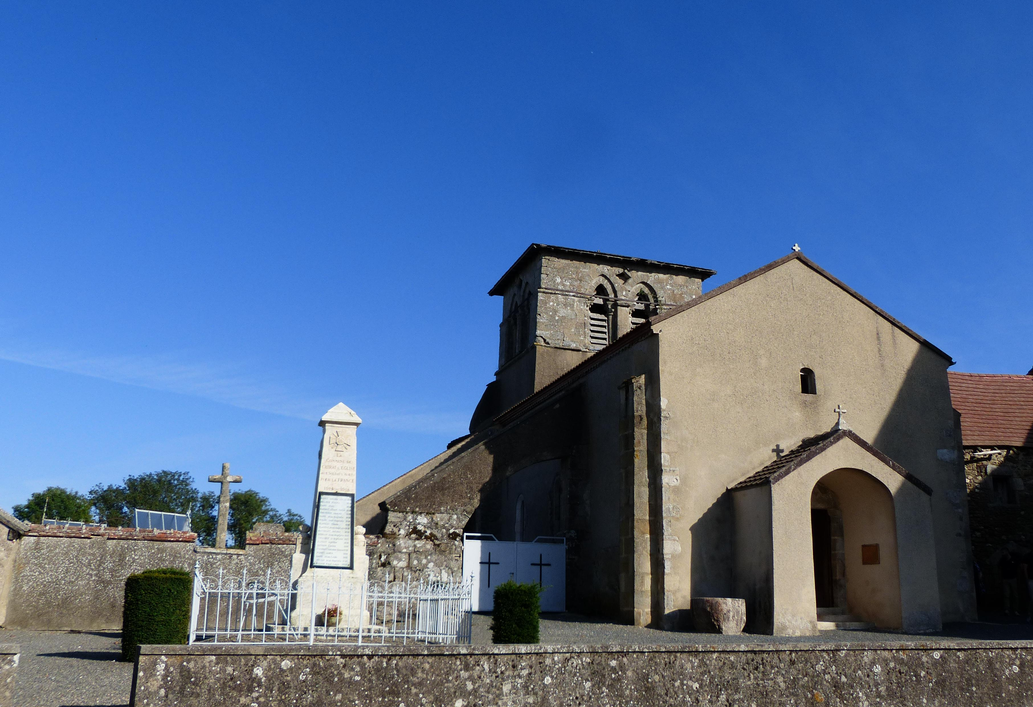 Chirat-l'Église (Allier, France). L'église et le monument aux morts. Derrière le monument aux morts : le cimetière. À droite, toiture de l'ancien prieuré.